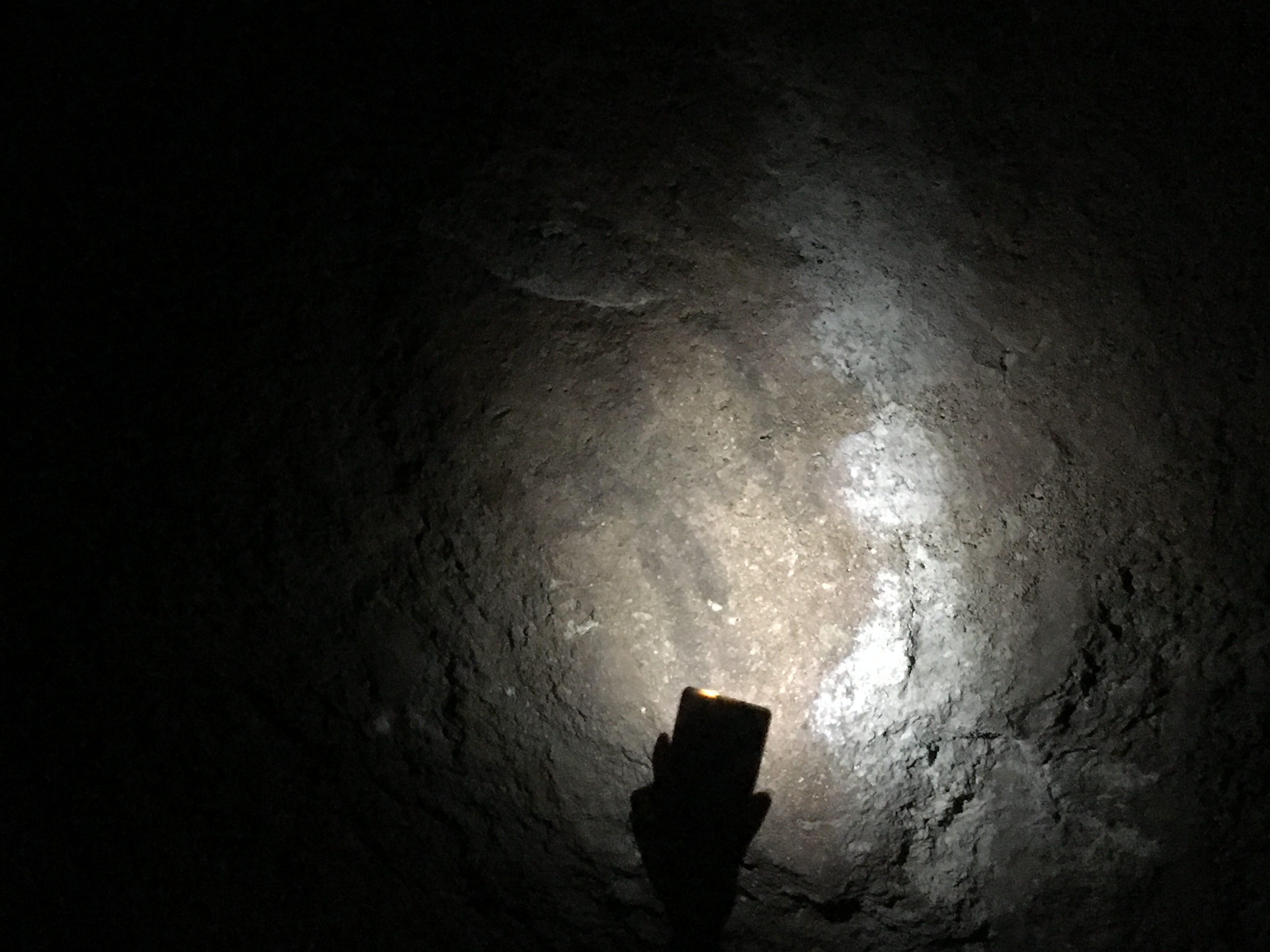 Graffito con l'arciere